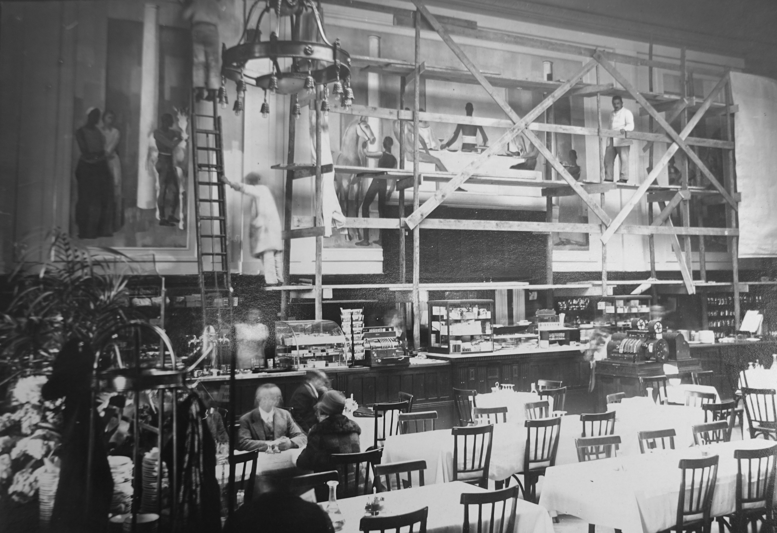 1922 erhielt Arnold Fiechter den Auftrag zu einem Wandgemälde im Bahnhof Basel für das 1.Klasse Bahnhofbuffet in Basel. Dort schuf er die nächsten vier Jahre das Triptychon Ölgemälde Das Gastmahl. (600 cm x 700 cm, 2 x 170cm x 370 cm). Die Fotografie befindet sich im öffentlich zugänglichen Staatsarchiv Baselland in Liestal, Schweiz.